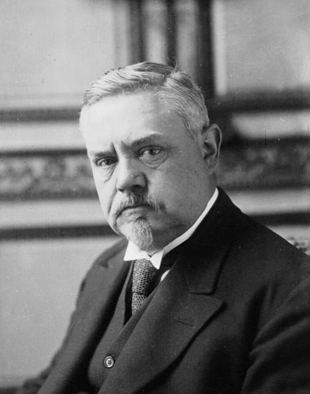 M. Oberkirch député, sous-secrétaire d'Etat au travail [photographie de presse]